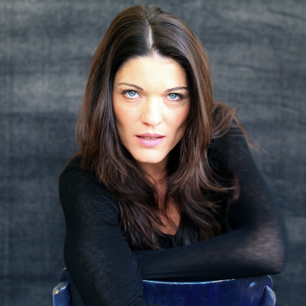 עינת ברנובסקי